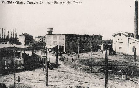 Modena - Deposito tram